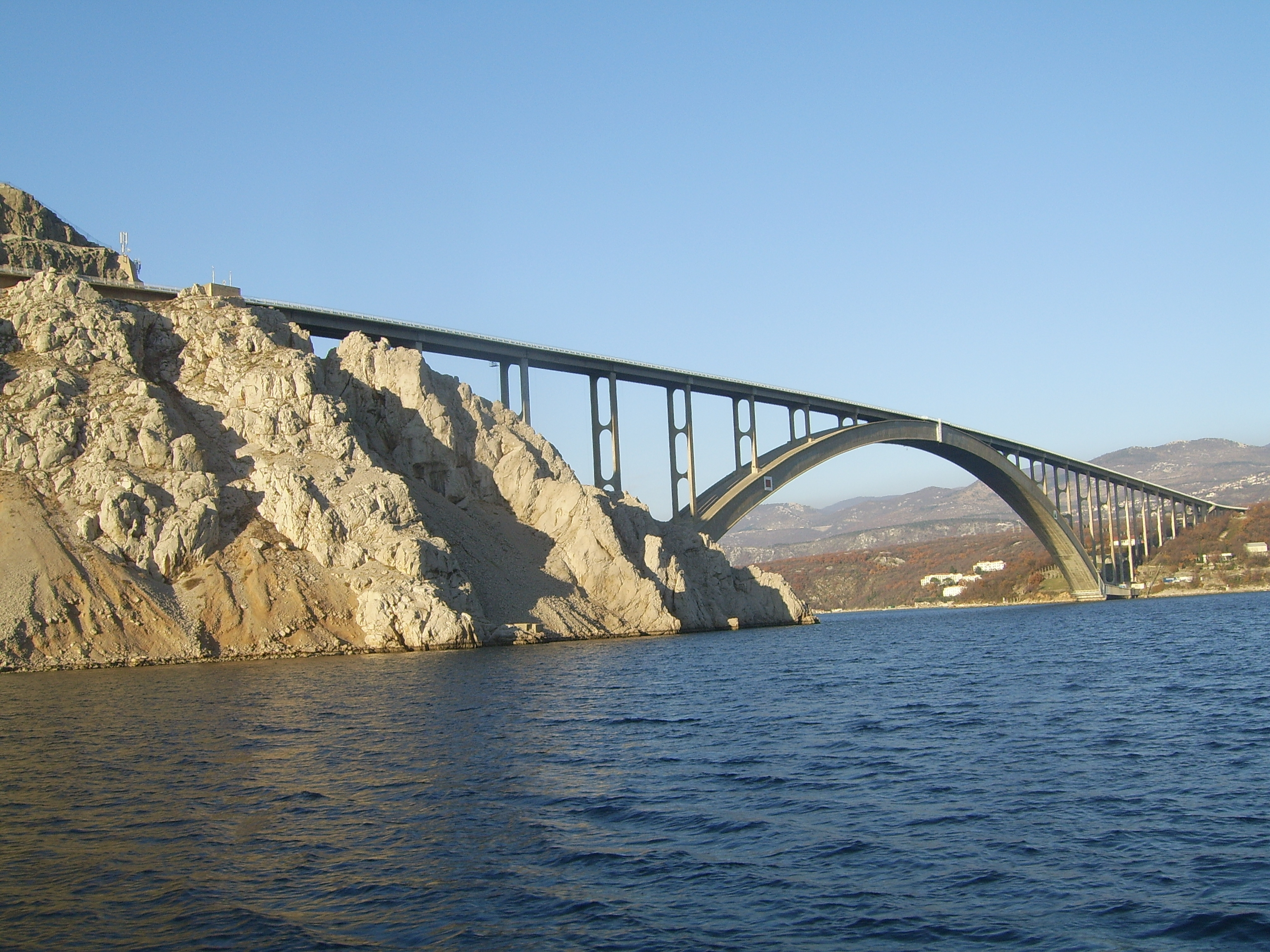 Veći luk Krčkog mosta između otoka Sveti Marko ( lijevo ) i kopna.